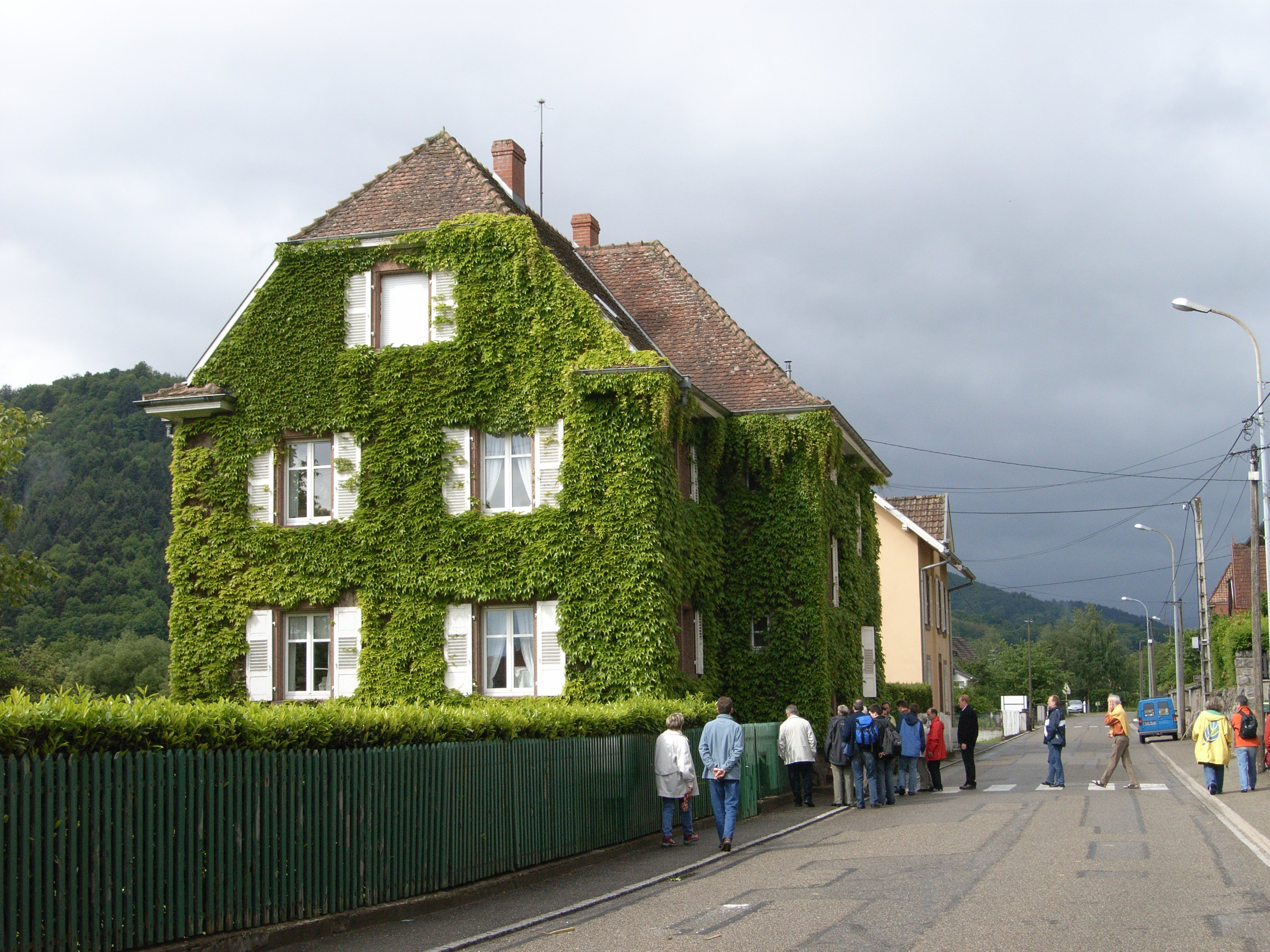 Albert Schweitzer-Archiv und Museum Gunsbach ; Günsbach